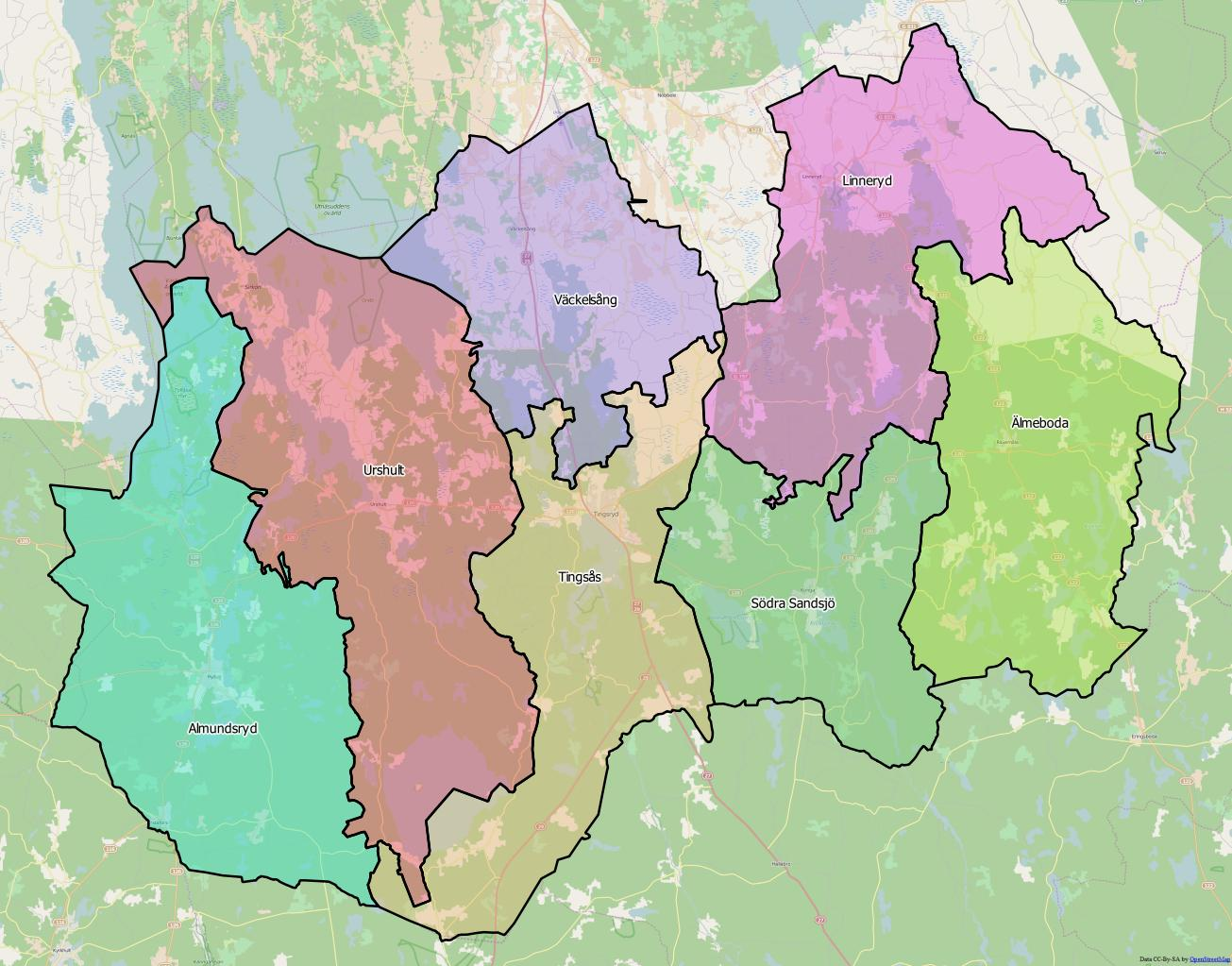 Distriktsindelningen i Tingsryds kommun World file: 75.21043679293860862 0 0 -75.21043679293860862 1619000.33166110469028354 7705136.23104135971516371